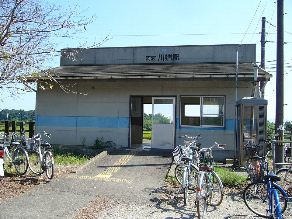 阿波川端駅 駅舎